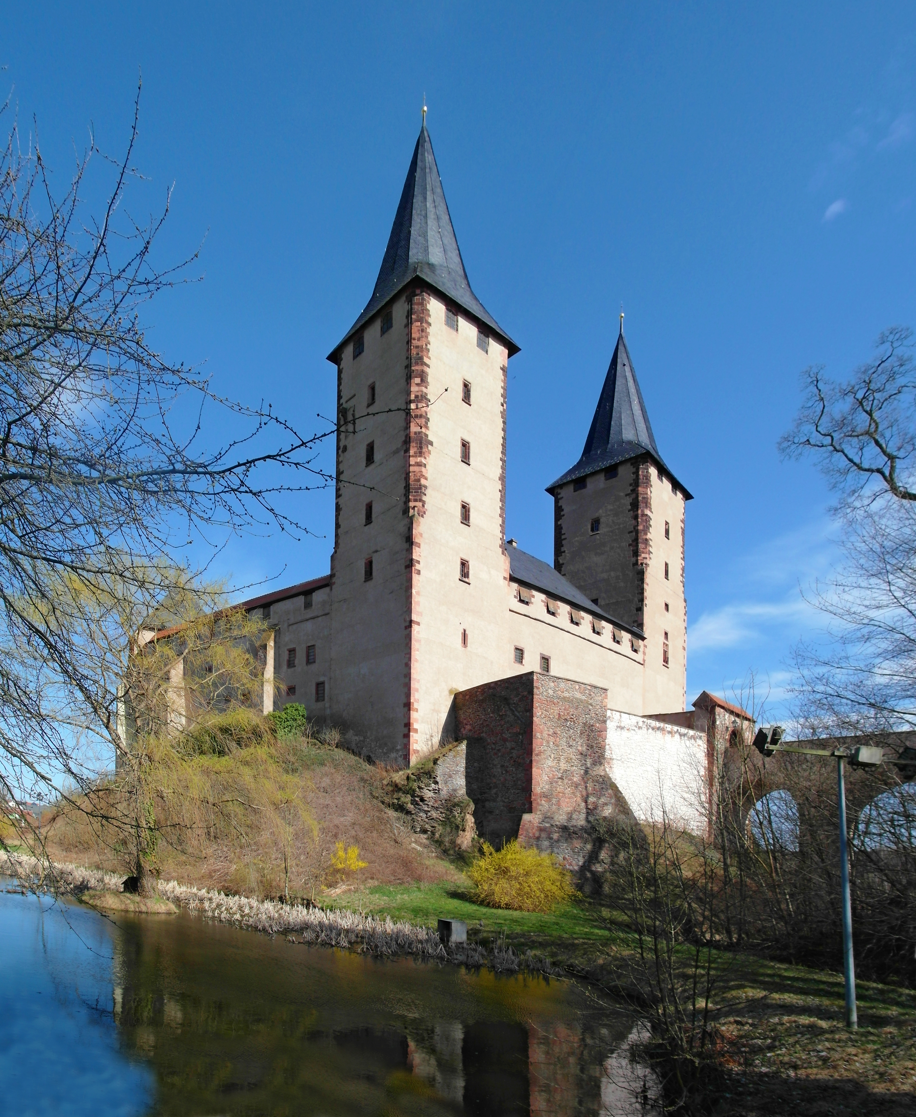 10.04.2018 09306 Rochlitz: Schloß (GMP: 51.045068,12.791399). Die erste Burg wurde hier im 10. Jahrhundert von König Heinrich I. gegründet. Das heutige Schoß geht auf Markgraf Wilhelm I. von Meißen Ende des 14. Jahrhunderts zurück. Seit dem 18. Jahrhundert war das Schloß nur noch Behördensitz. Die Gerichtsnutzung endete erst 1990. Sicht von Nordwesten. [SAM5287-5288.JPG]20180410550MDR.JPG(c)Blobelt